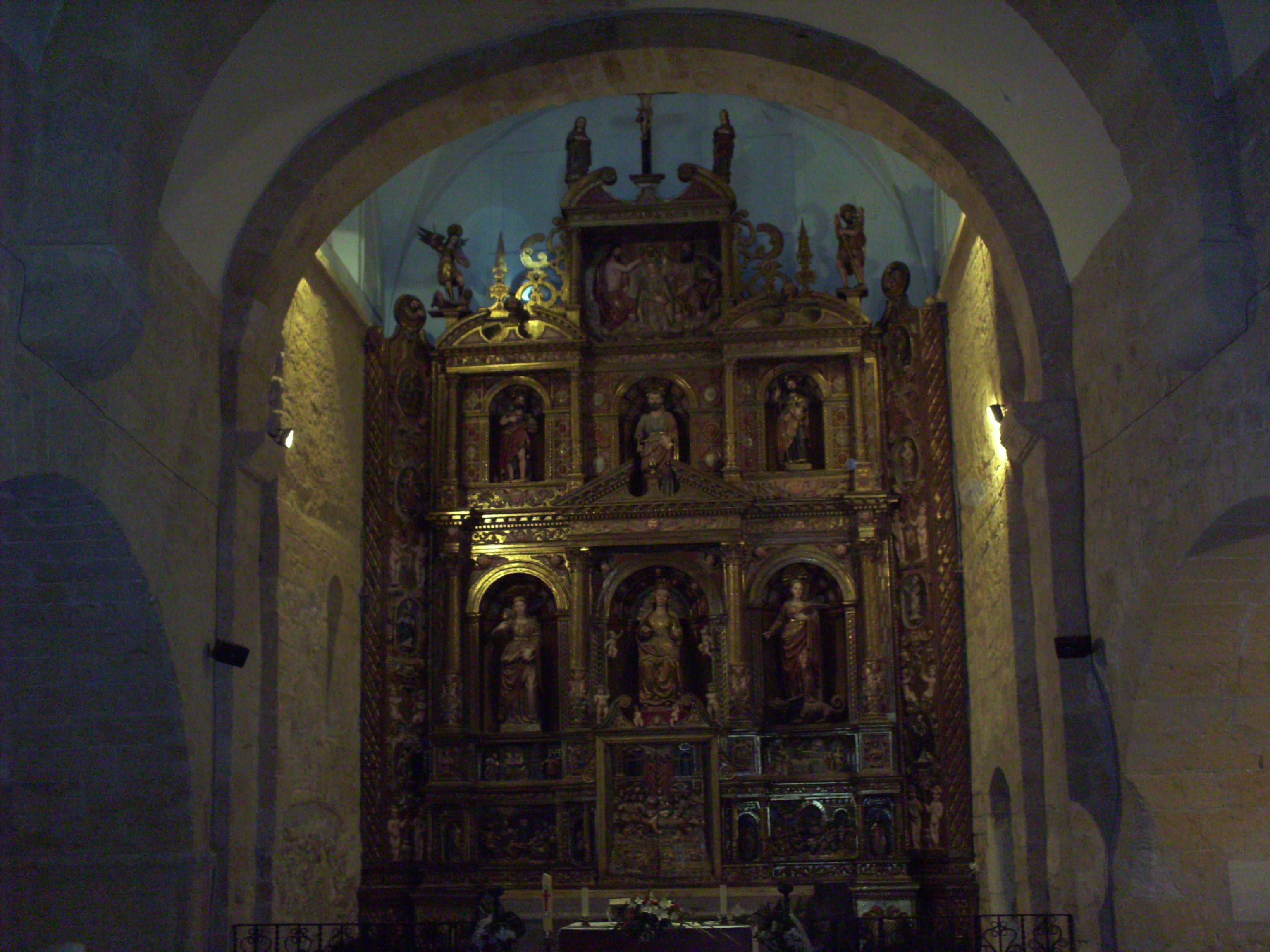 Retaule de la capella del castell de Tamarit